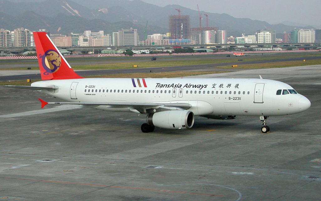 TransAsia A320-232 B-22311 at Taipei Sung Shan on January 8, 2001.